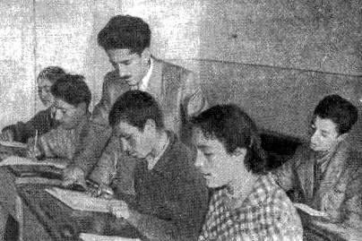 Курдские Студенты в Советской Армении